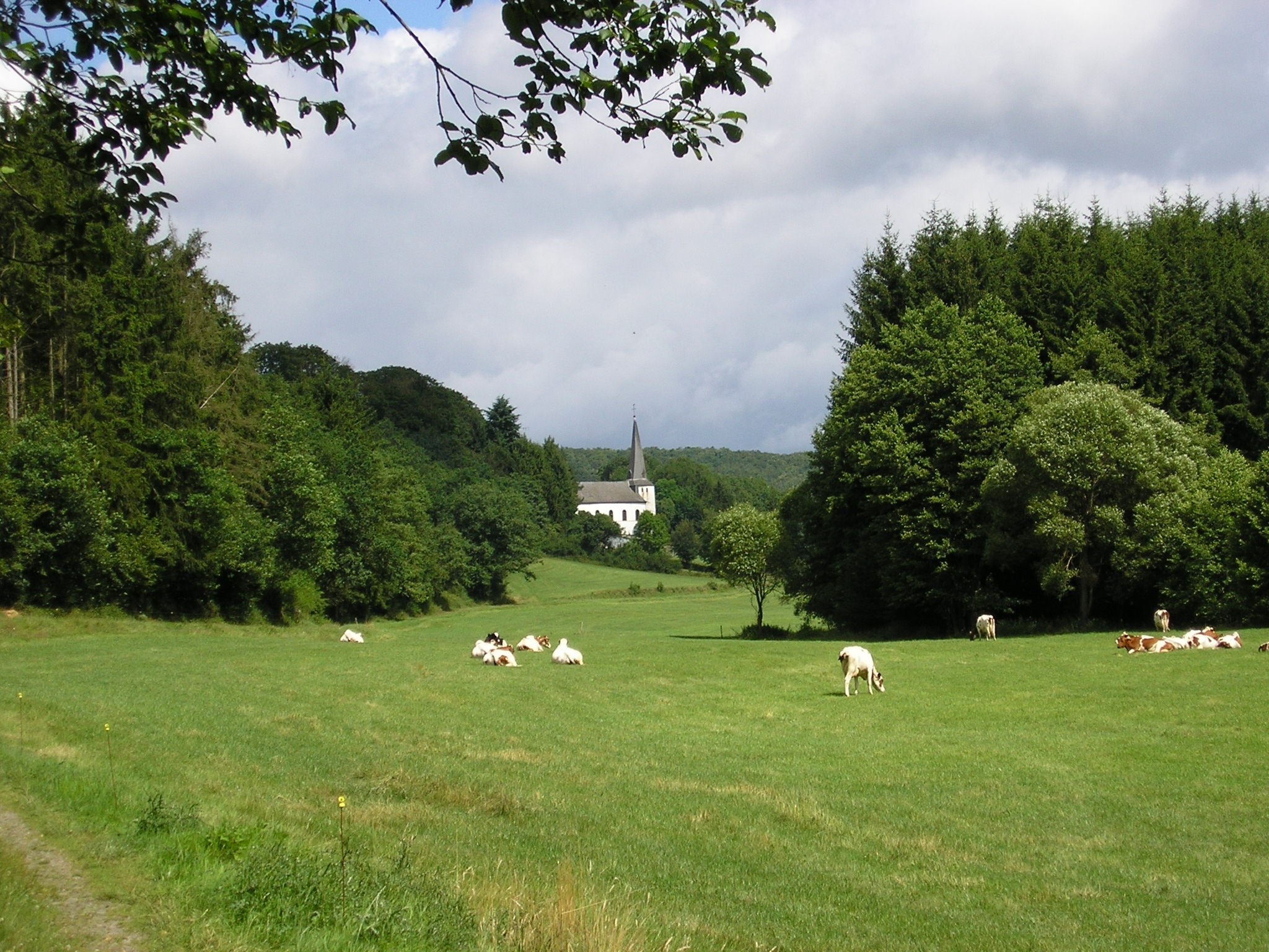 Pintsch (Luxemburgisch:Pensch), Dorf in der Gemeinde von Kiischpelt im nördlichen Luxemburg; am Pintscher Bach zwischen Lellingen und Pintsch